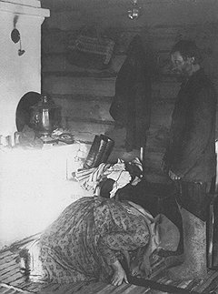 Прощеное воскресенье во Владимирской губернии